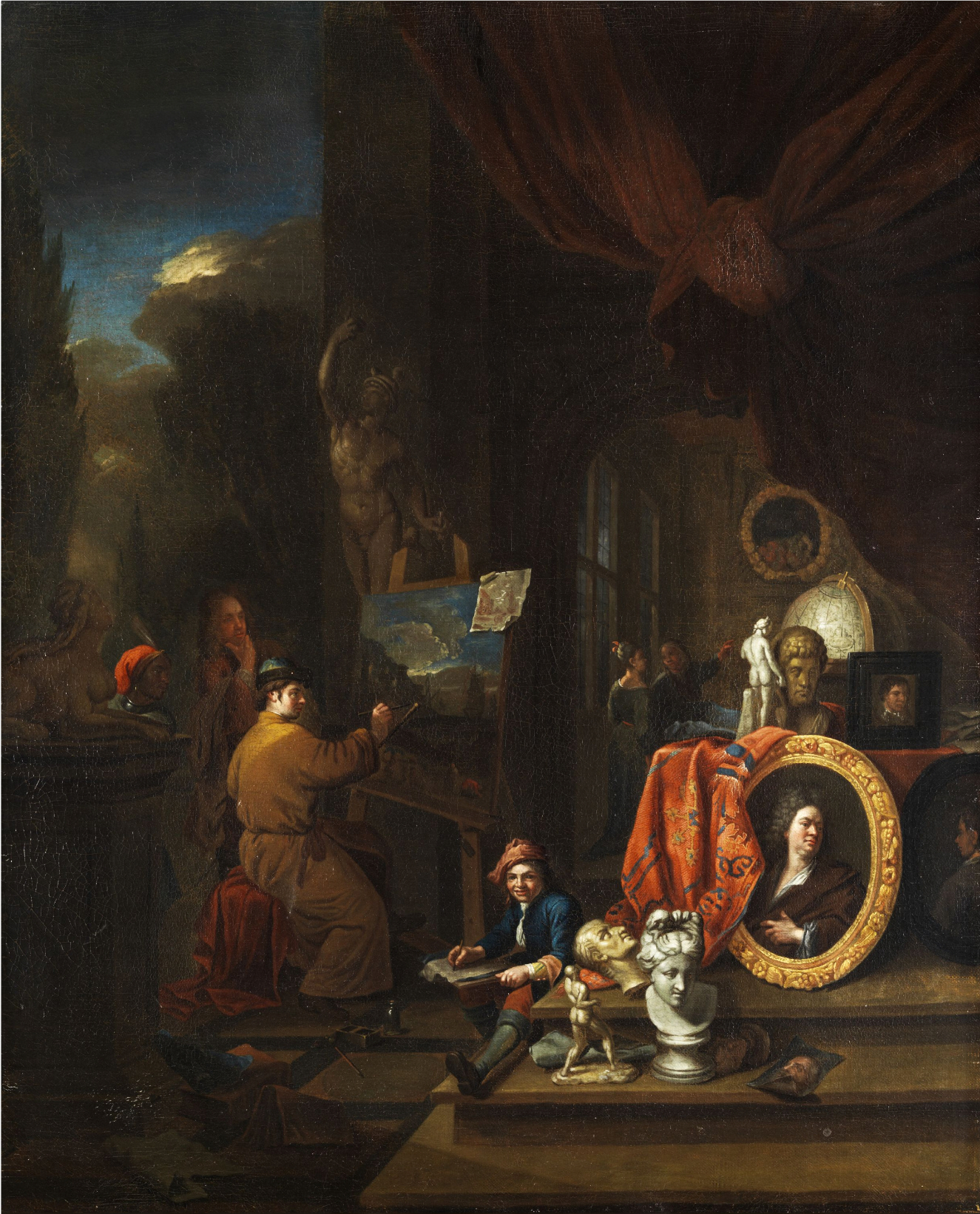 Der Maler im Atelier